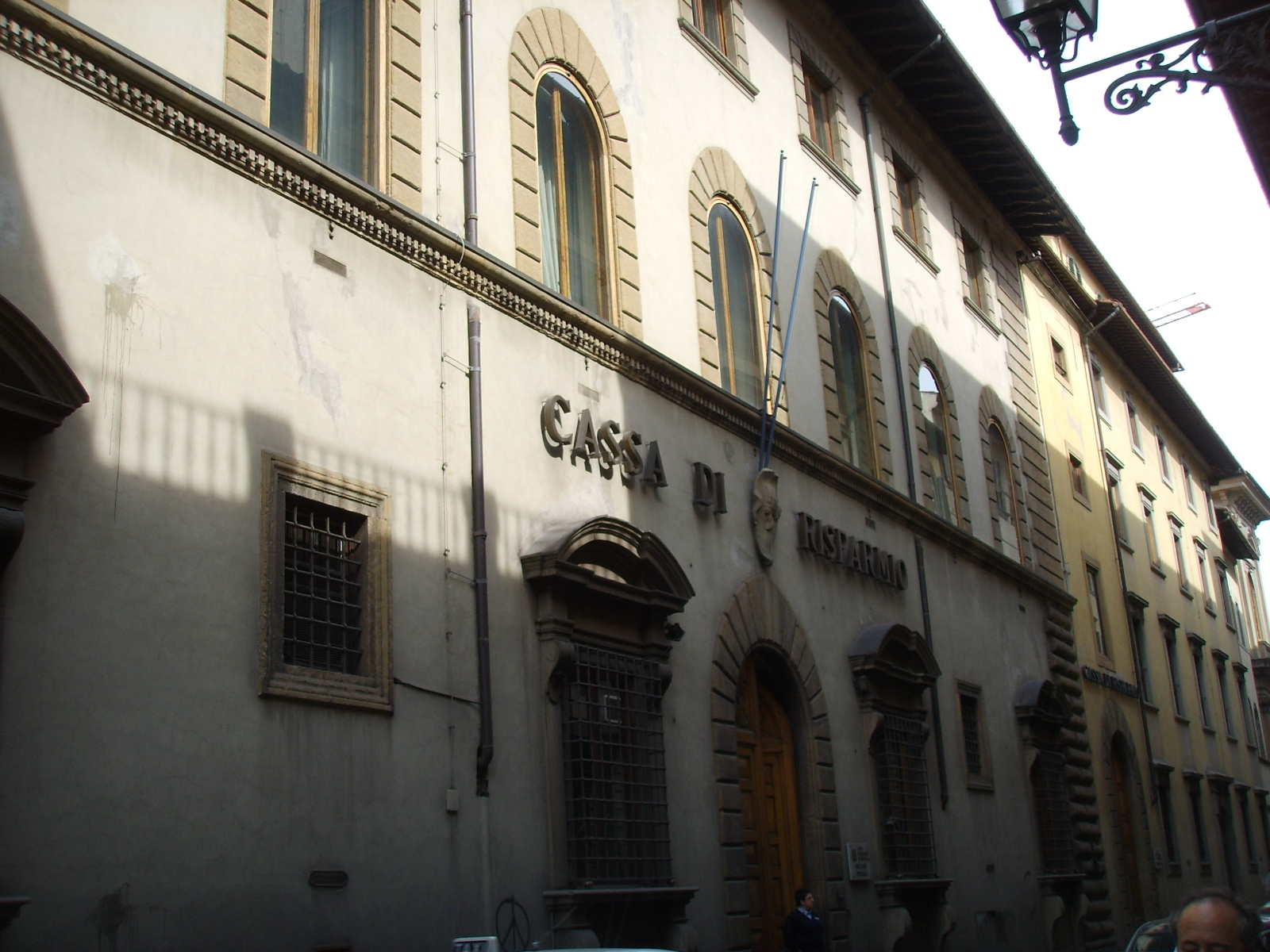 Sede_Cassa_di_Risparmio (palazzo Pucci d'Ottavio) in Florence